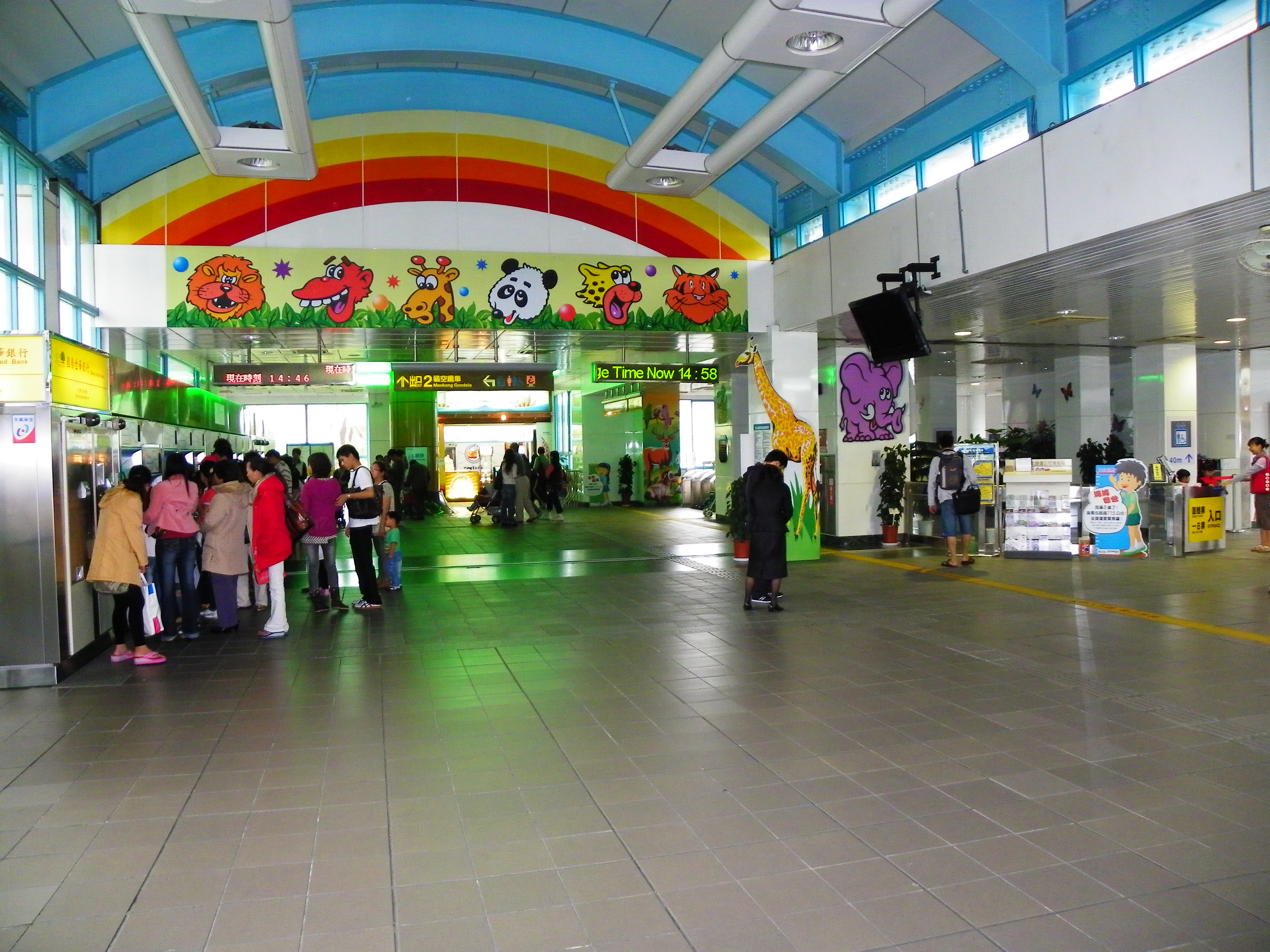 台北捷運文山線動物園駅のロビー。